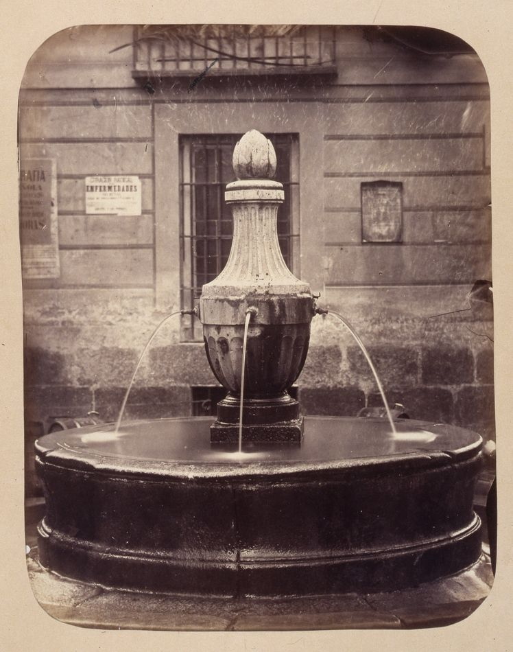 Fuente en la corredera de San Pablo. Obra en 1864 del fotógrafo toledano Alfonso Begué, muerto el 31 de octubre de 1865. Cartulina sepia. Albúmina. 43 x 32 cm. Fotografía contenida en un álbum procedente del Archivo de Villa y trasladado al Museo de Historia en 1983.